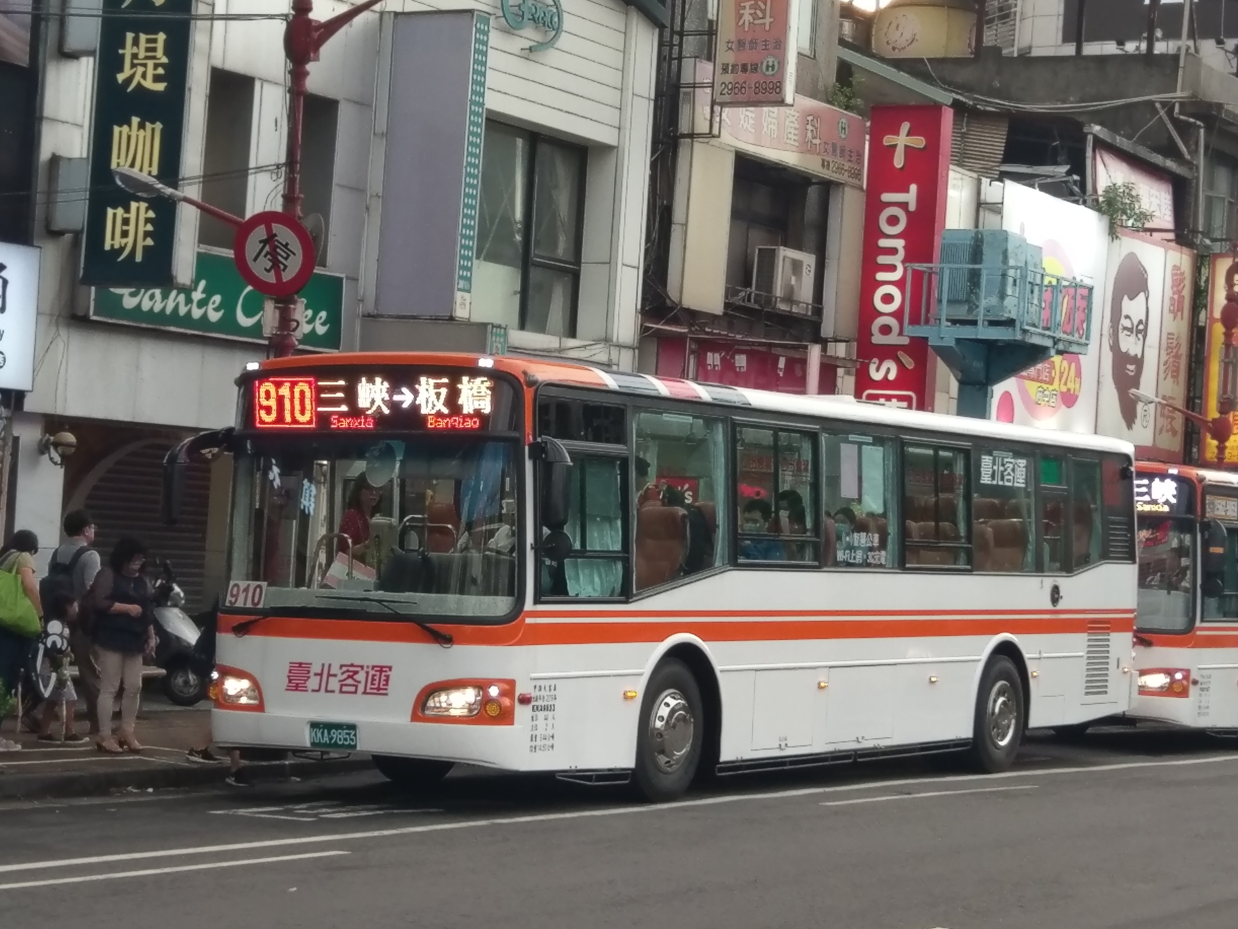 中文（台灣）: 臺北客運2019年新車KKA-9853，車頭字體有更動，且車頭車側車尾皆為全彩LED。臺北捷運府中站拍攝。